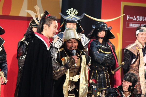 '12.2.5ｻﾑﾗｲｻﾐｯﾄ